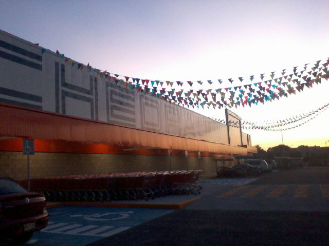 Chedraui Macuspana Hipermercado